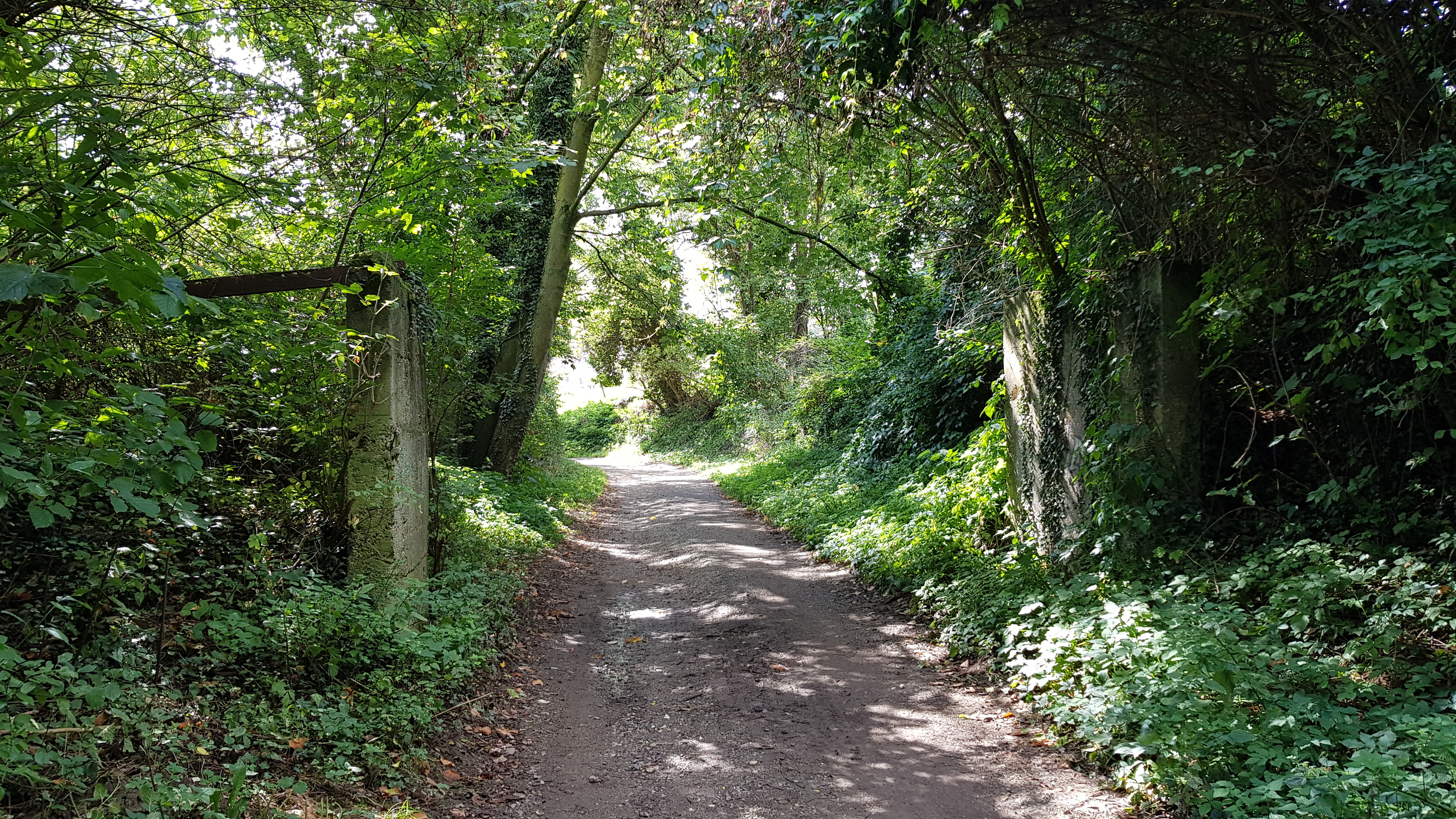 bruggetje achter Europahuis bij Mariagrot, Bemelen, Nederland